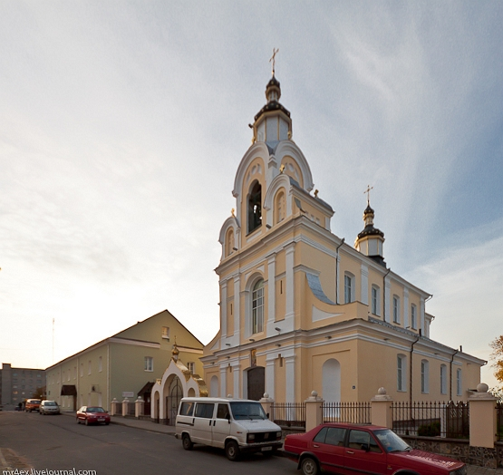 Мікалаеўскі сабор у Навагрудку